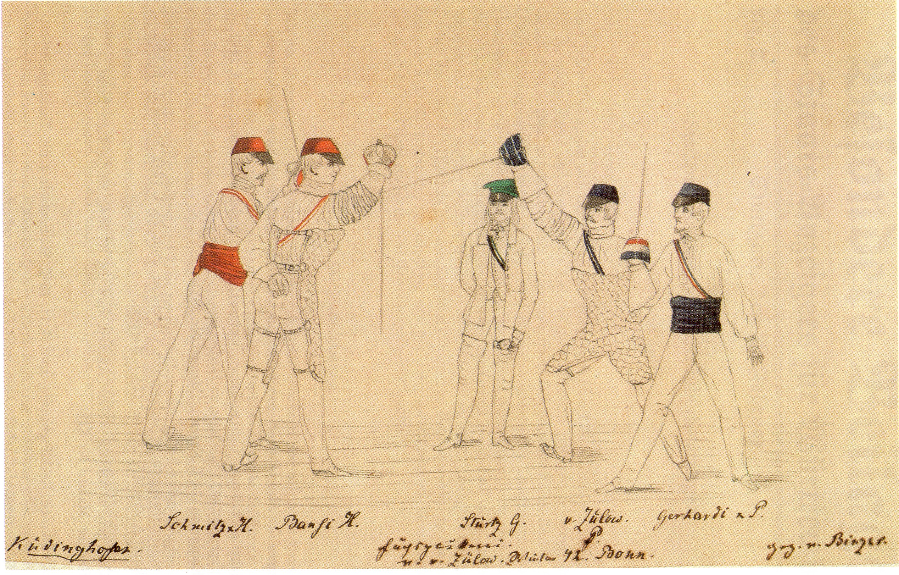 Mensur Hansea Bonn (Gustav-Lucas Banse) c/a Palatia Bonn (Christian v. Zülow), 1842